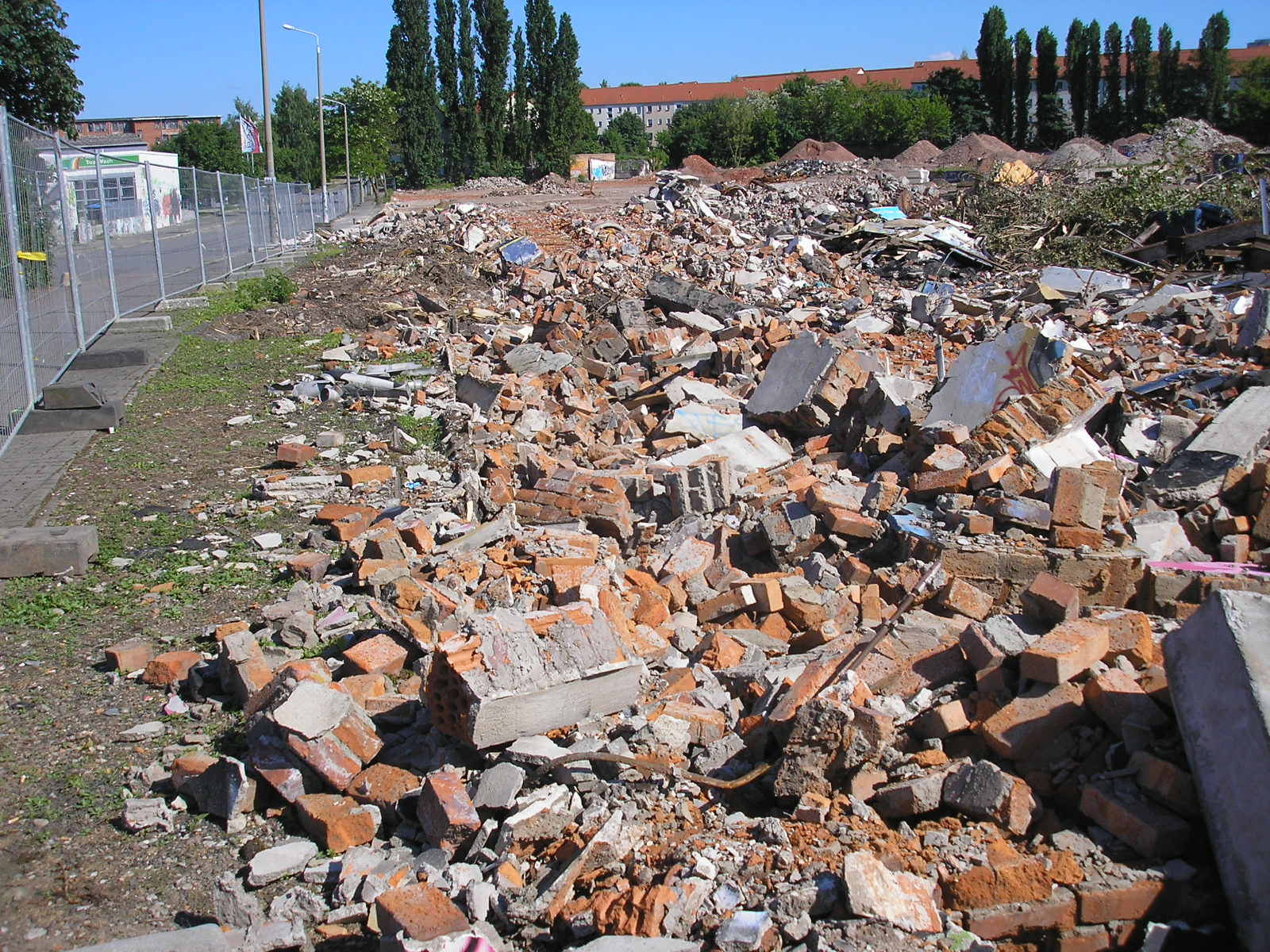 Überreste des Besetzten Hauses auf dem ehemaligen Fabrikgelände von "Topf und Söhne" in Erfurt.